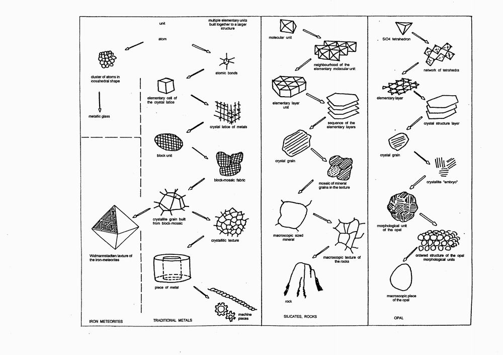 Az anyagszerkezeti hierarchia háromféle anyag esetén: fém, szilikát és opál